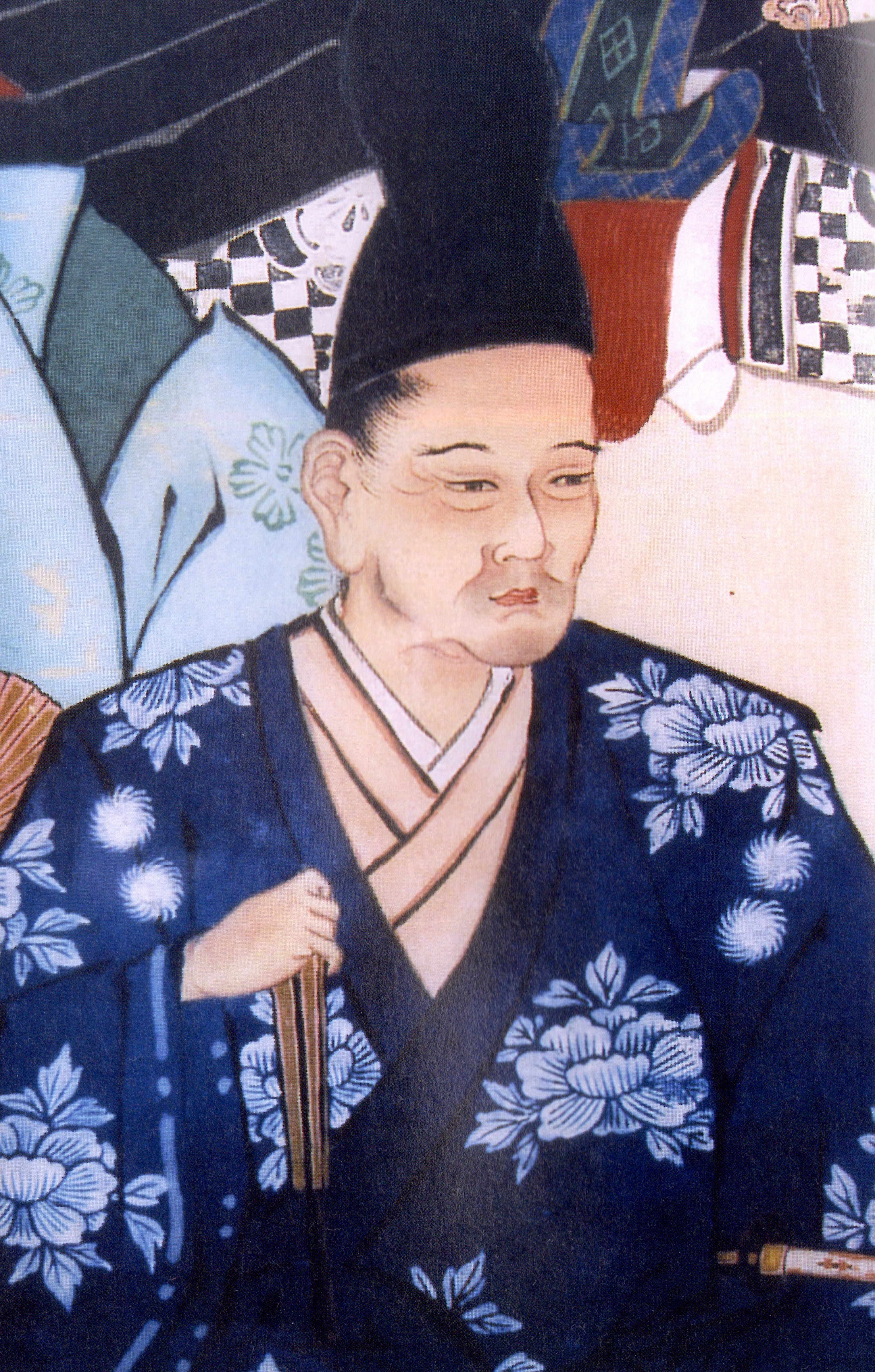 津軽信英の肖像。